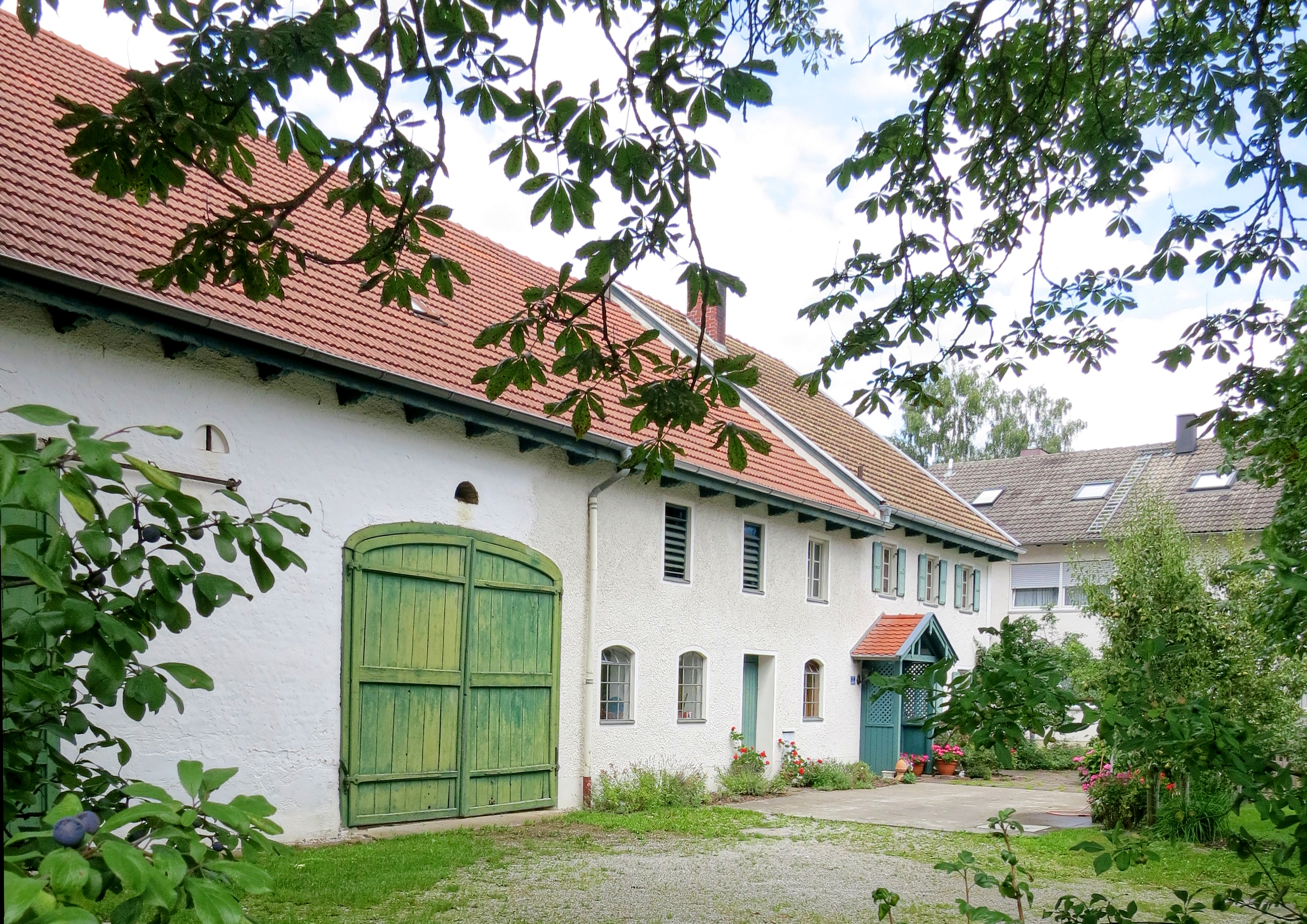 Ehemaliges Bauernhaus Mammendorfer Straße 7 in Jesenwang - Totale aus Süd aufgenommen